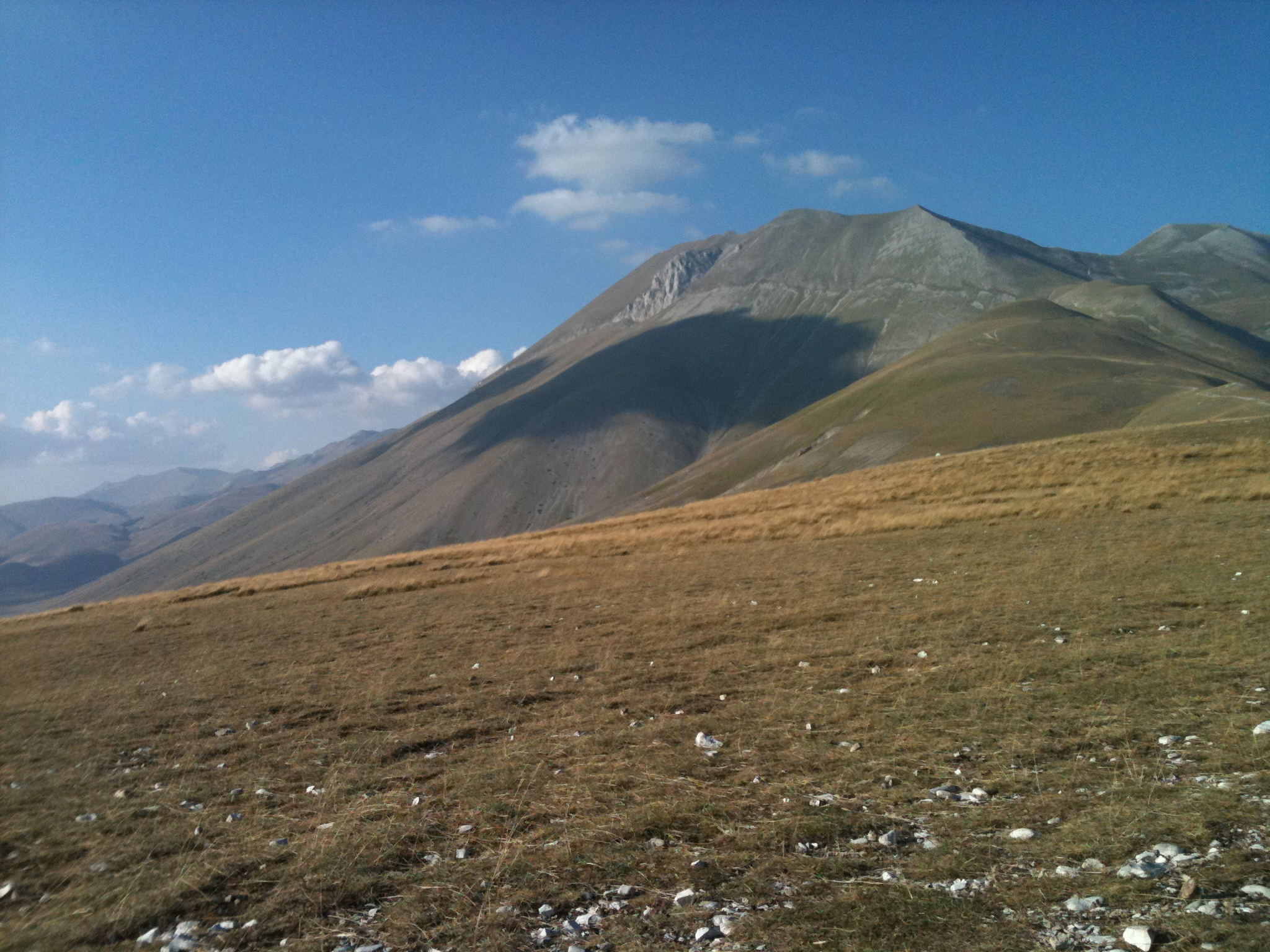 veduta del Monte Vettore dalla parte umbra